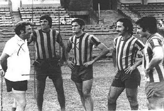 Angel Labruna junto a Angel Landucci, Aurelio Pascuttini, Roberto Gramajo y Aldo Poy.